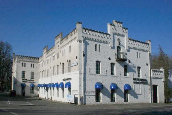 Südwest Seite der Hopltzmühle